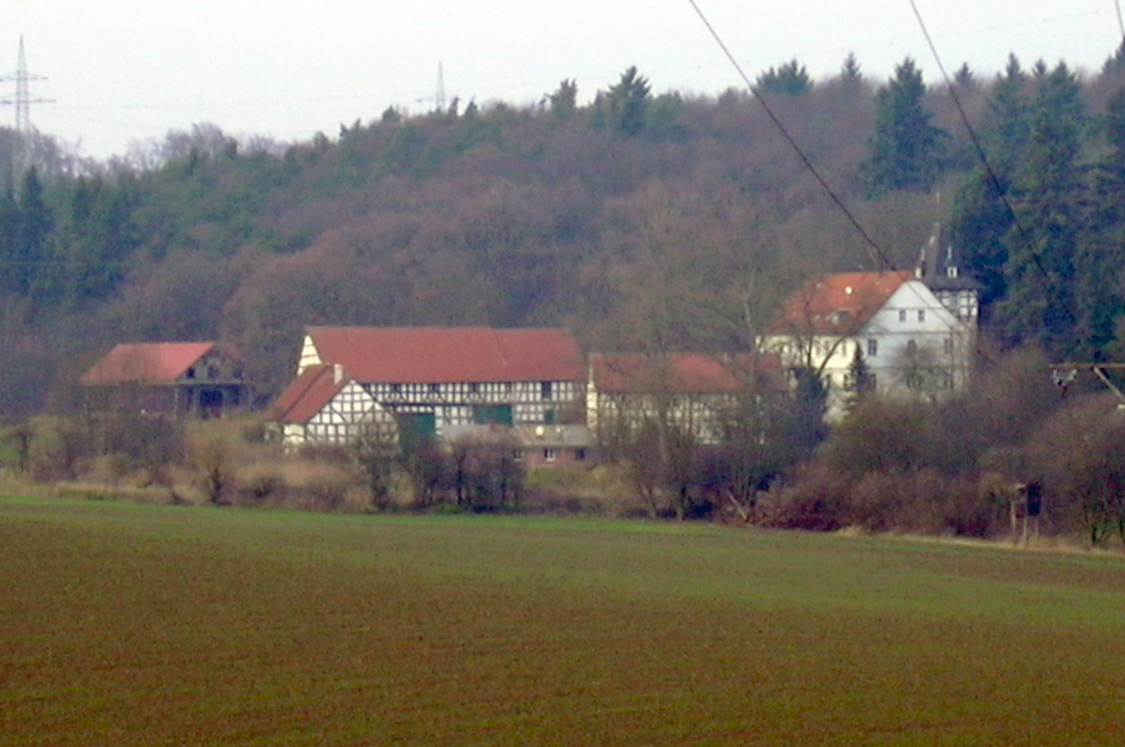 Blick auf das Hofgut Germershausen (Gemeinde Weimar/Lahn)